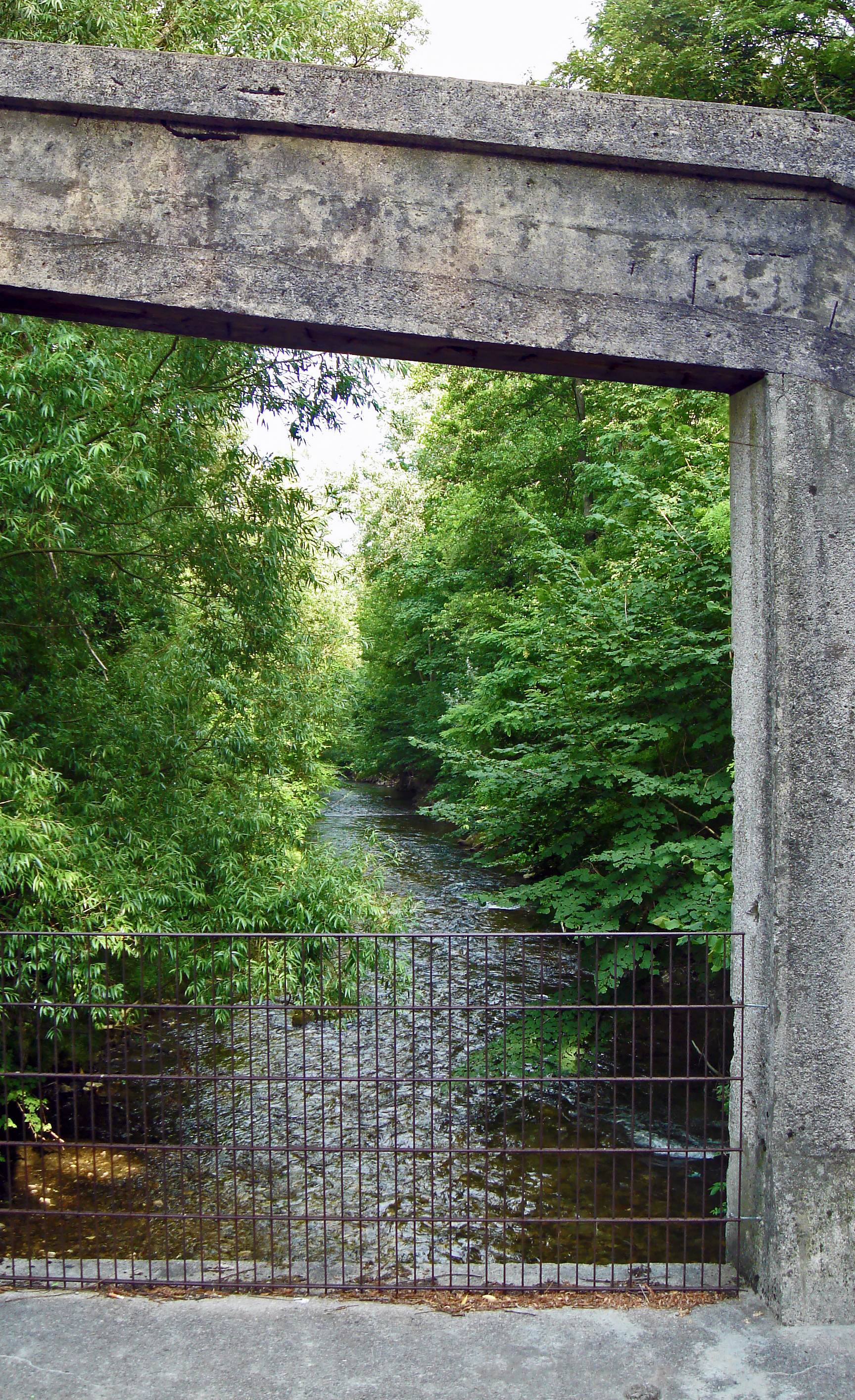 Niederösterreich, Enzesfeld(-Lindabrunn), nächst Triestingtal-Radweg. Blick von der ehemaligen Schleppbahnbrücke der Enz-Caro-Werke flussabwärts nächst dem Triestingtaler Rad-/Spazierweg unweit der Industrieansiedlung ARED-Park.